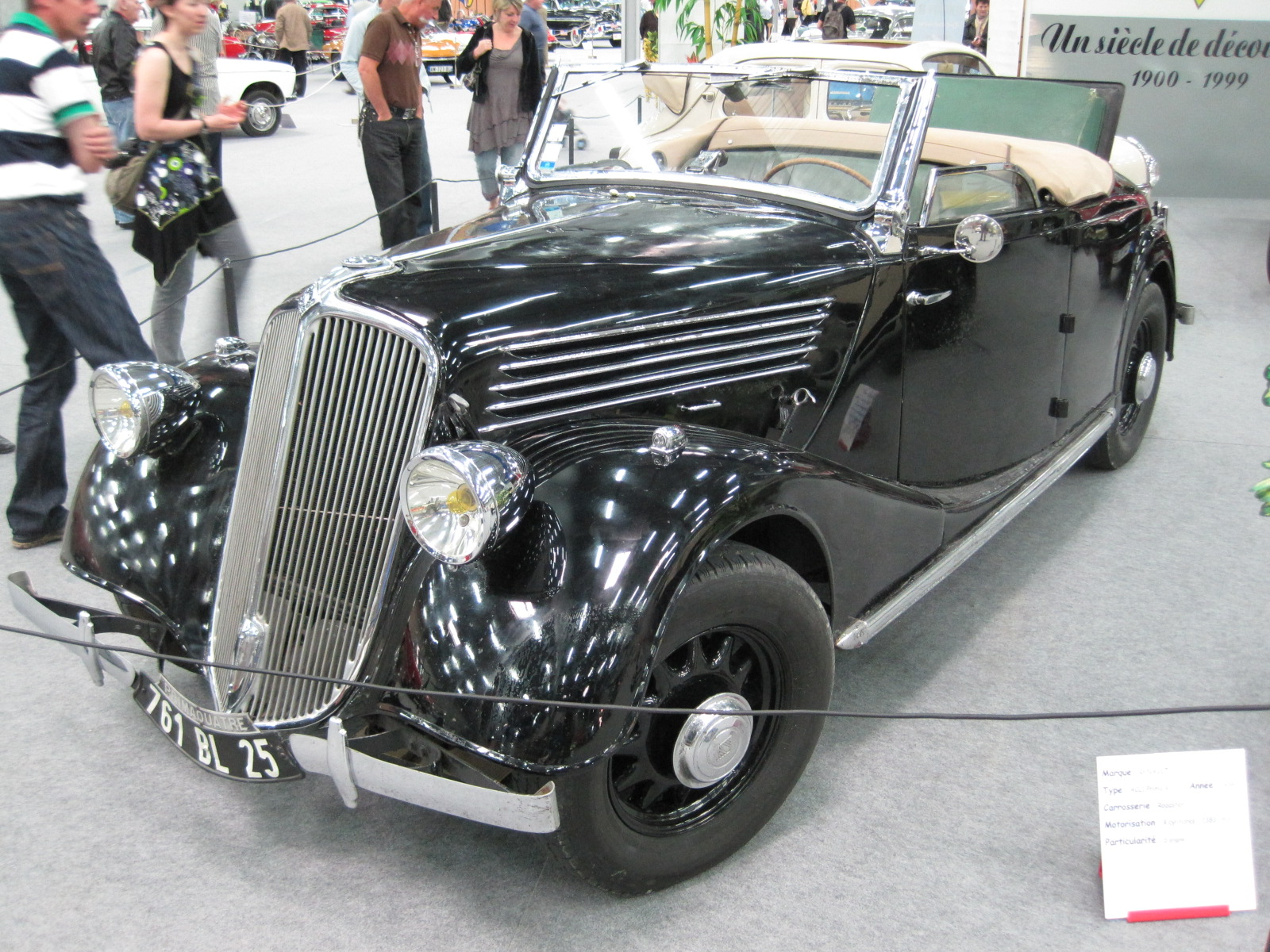 Renault ACL1 Primaquate cabriolet roadster 1936